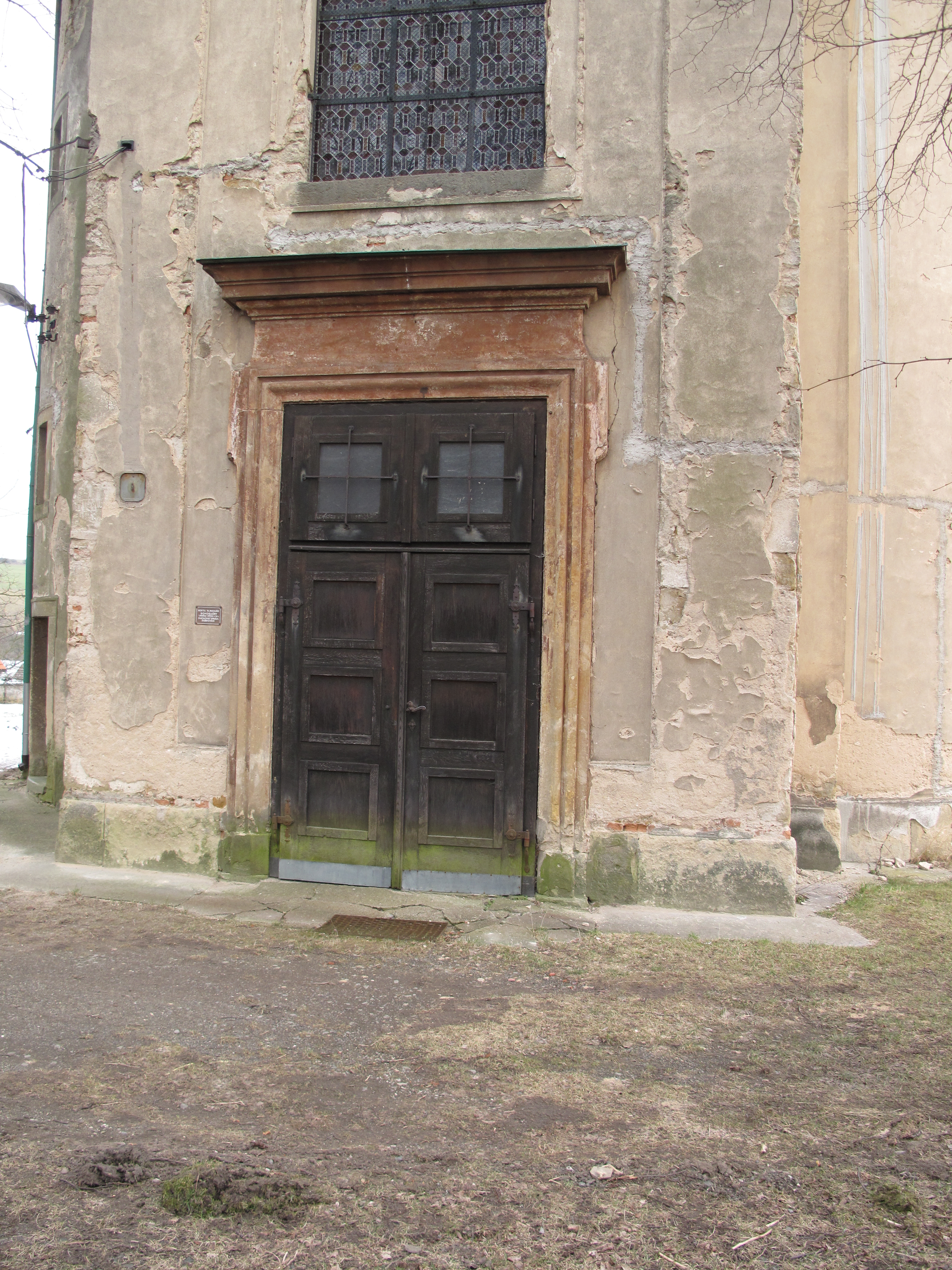 Dveře kostela v Žerčicích. Okres Mladá Boleslav, Česká republika.